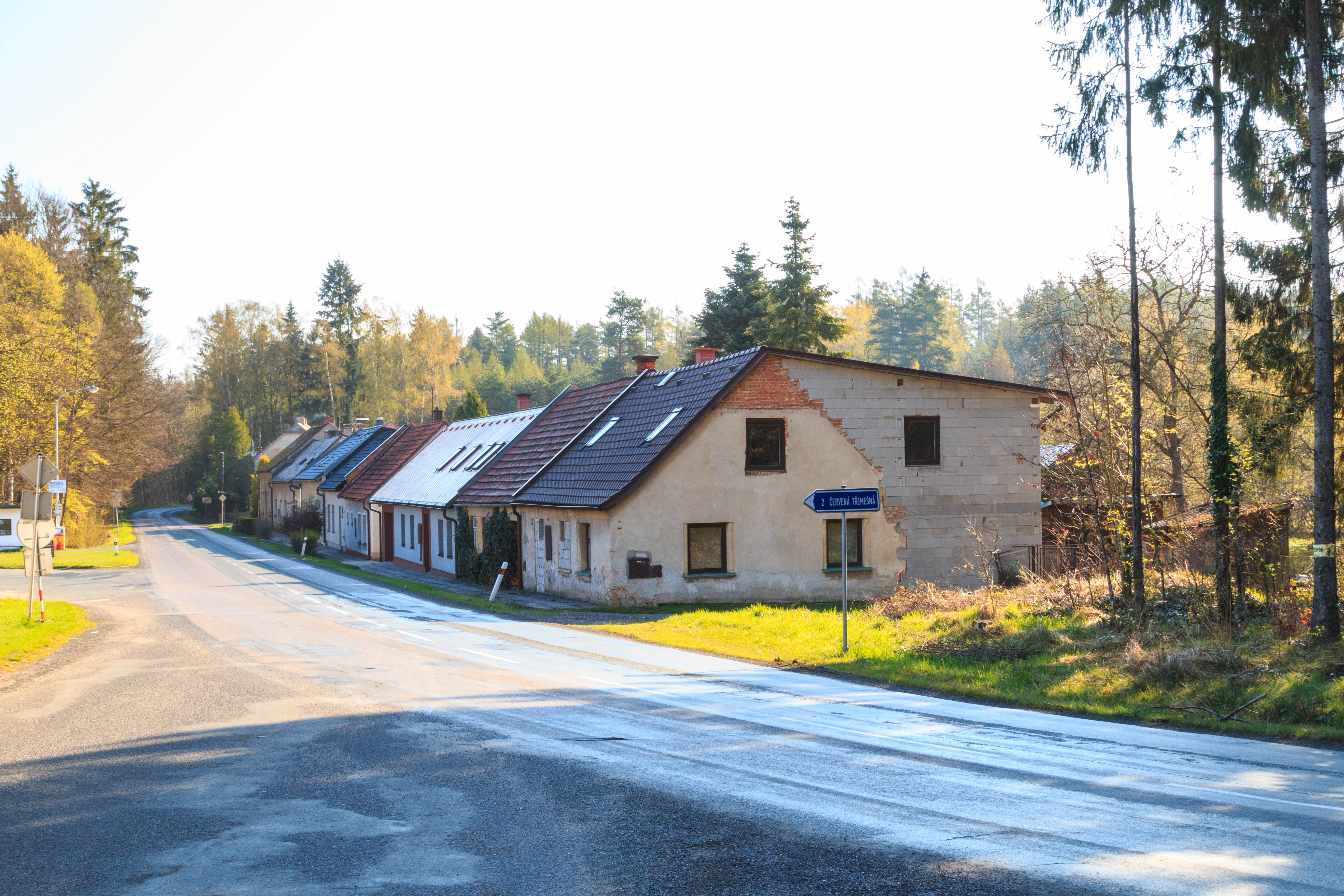 Dachovy - dům čp. 478